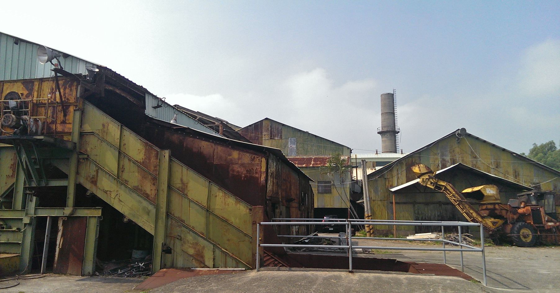 中文（台灣）: 月眉糖廠工廠外觀